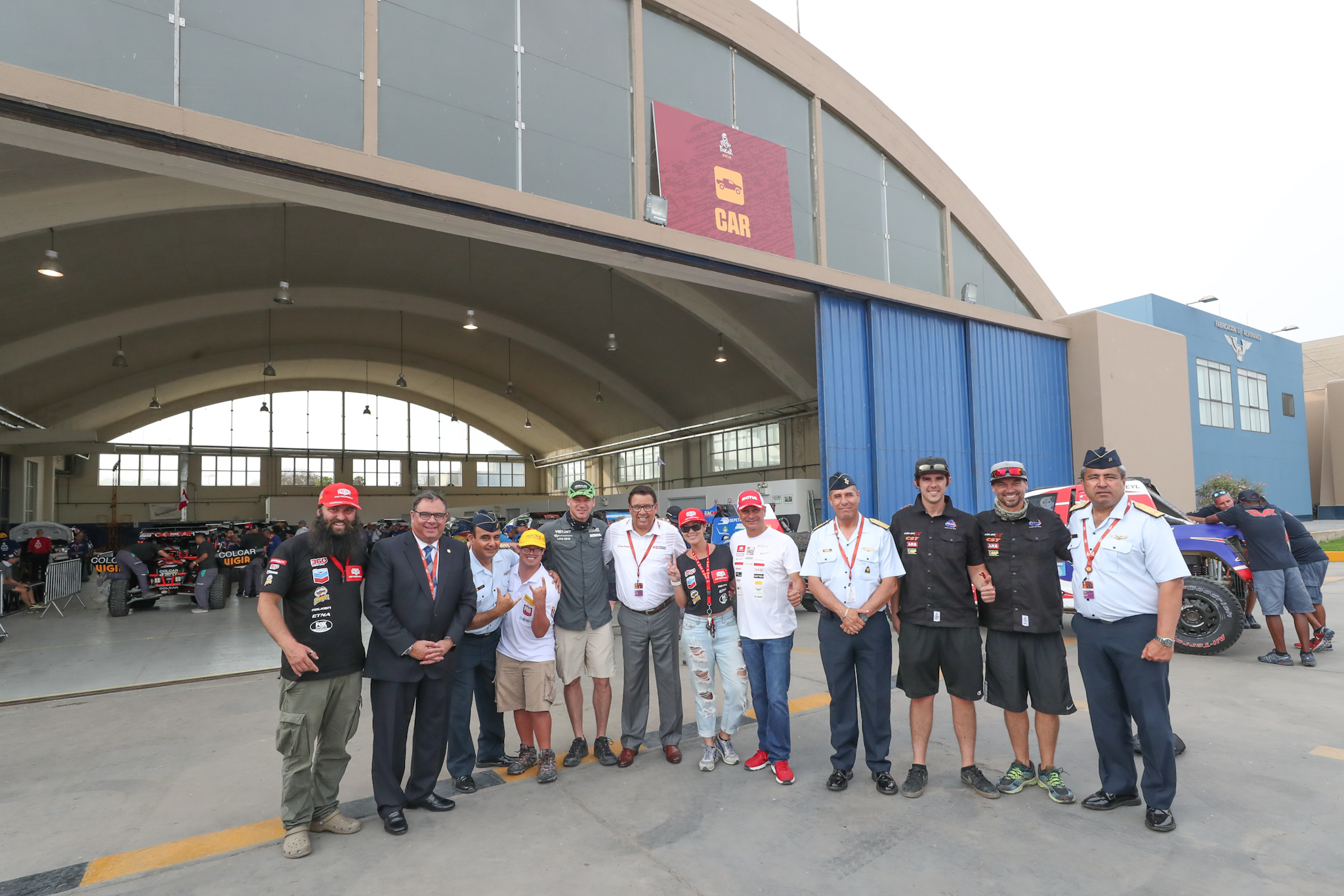 Participantes del Dakar en Perú de 2019 con el ministro de defensa José Modesto Huerta Torres en la base militar Las Palmas.